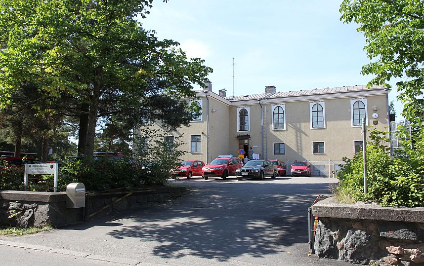 Pelastuskoulu Helsingin Etelä-Haagassa (Steniuksentie). Huom: Muista säilyttää viittaus kuvaajaan, mikäli käytät kuvaa.